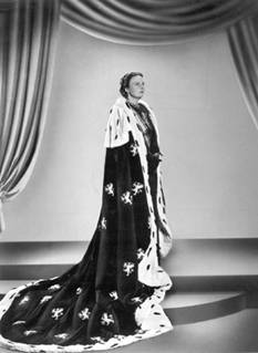 Koningin Juliana, 1948